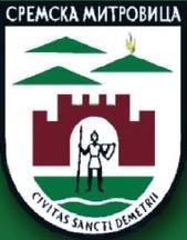 Wappen Gemeinde Sremska Mitrovica